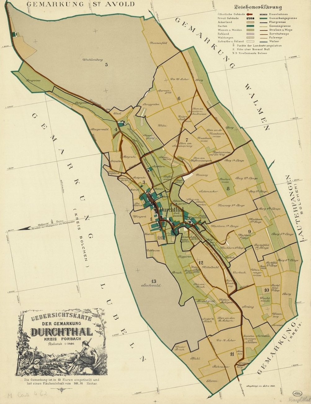 Plans cadastraux -- France -- Moselle. Cadastre établi en 1836, revu en 1909.